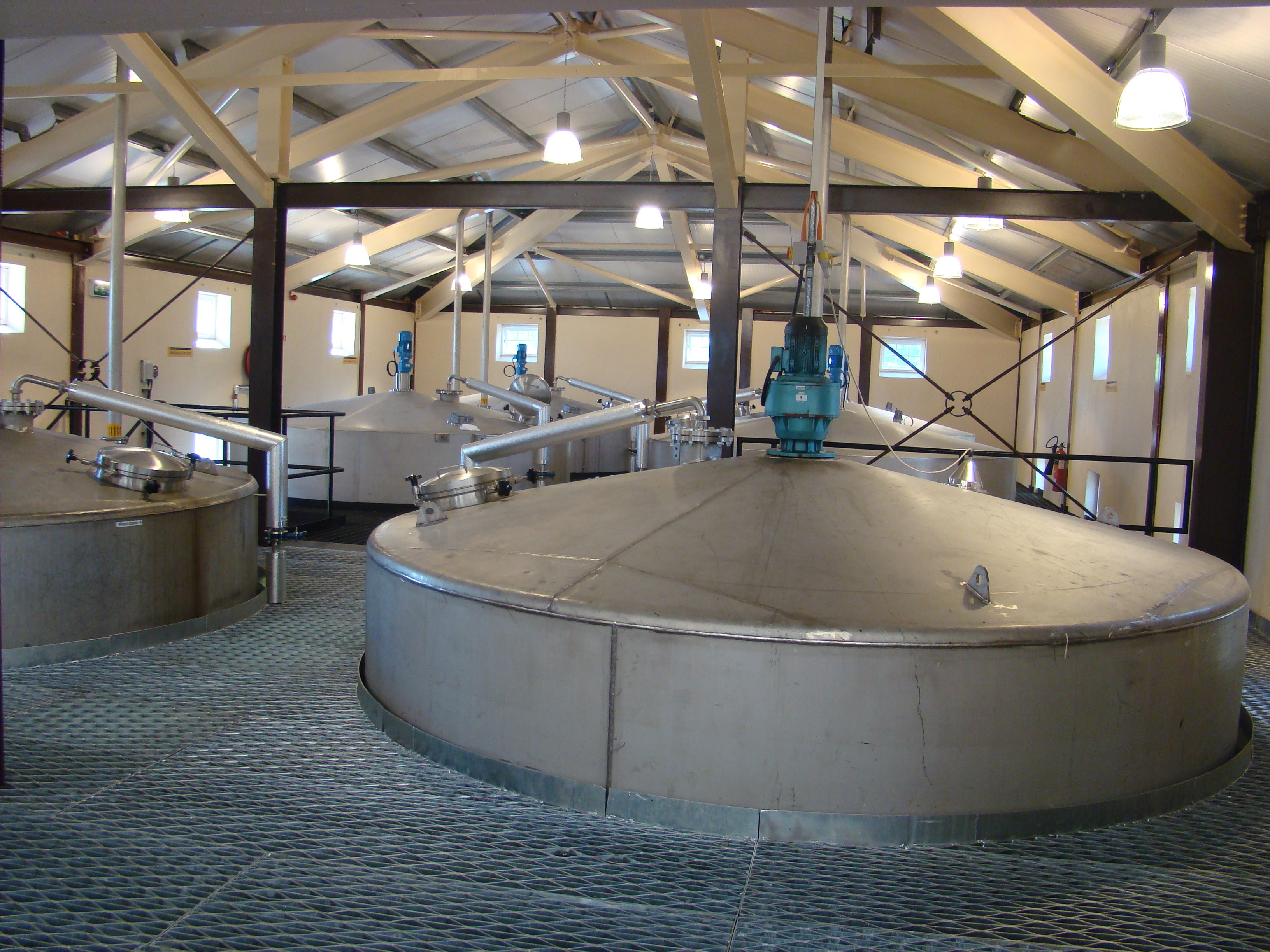 Maischebottiche in der Glenmorangie Destille